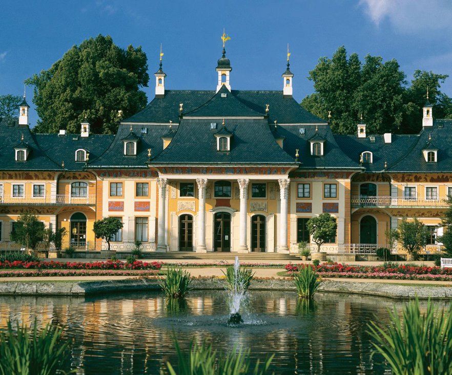 Kunstgewerbemuseum, Staatliche Kunstsammlungen Dresden. Foto: Werner LieberknechtPillnitzAußenfassade des Bergpalais.Kunstgewerbemuseum der Staatlichen Kunstsammlungen DresdenVerwendung nur mit Genehmigung und Quellenangabe